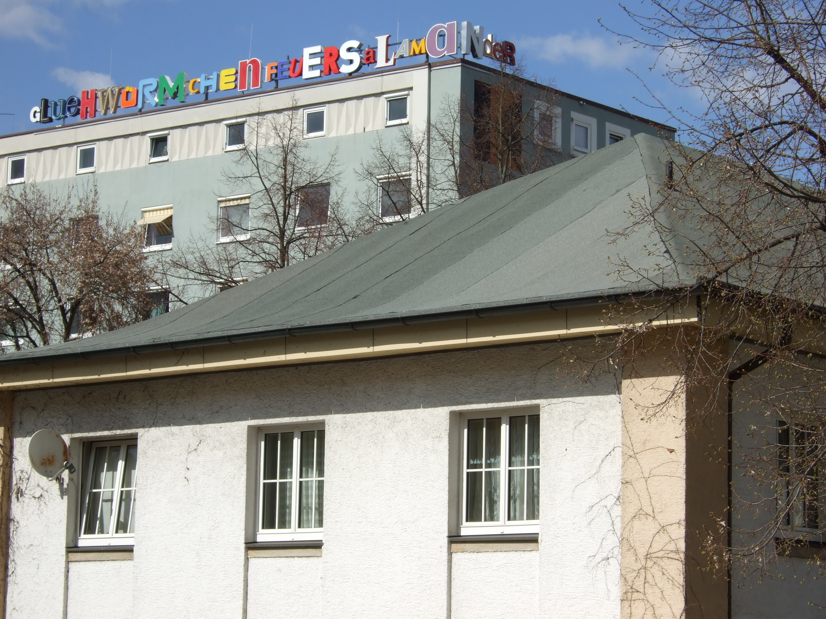 Gluehwürmchenfeuersalamander